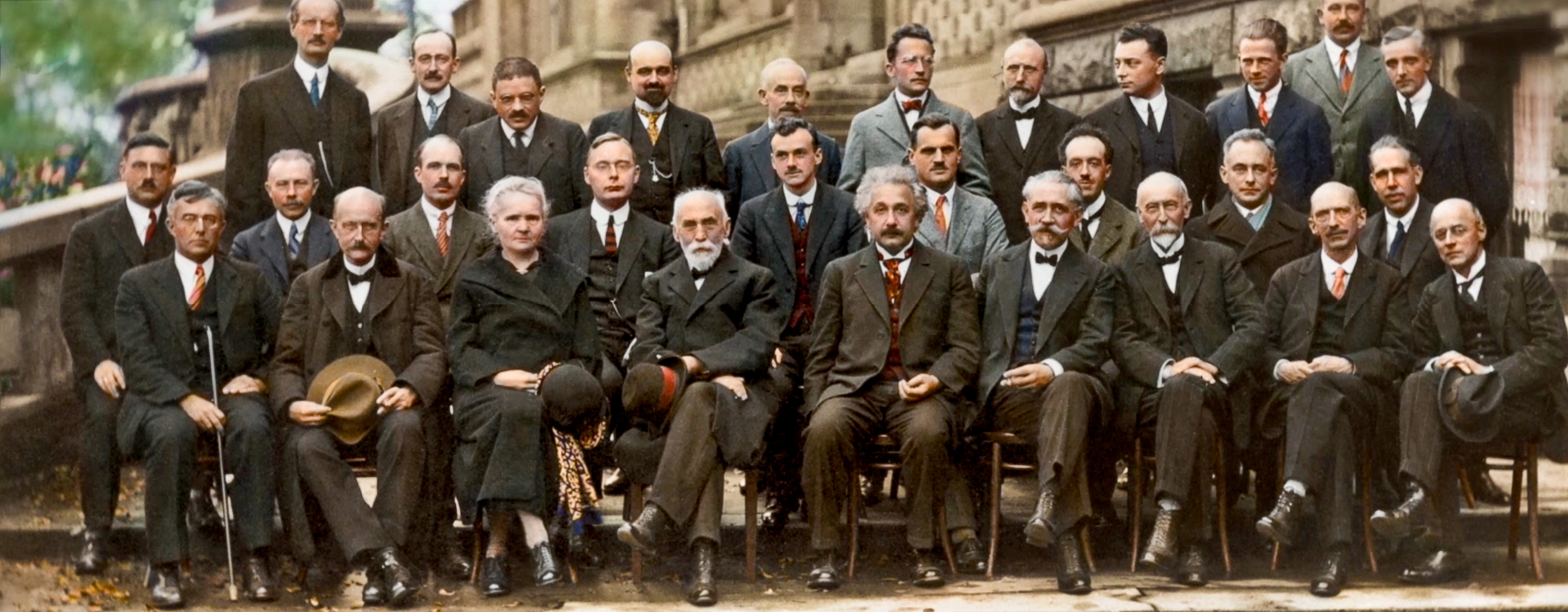 Учасники Сольвеївського конгресу 1927 року(в кольорі)